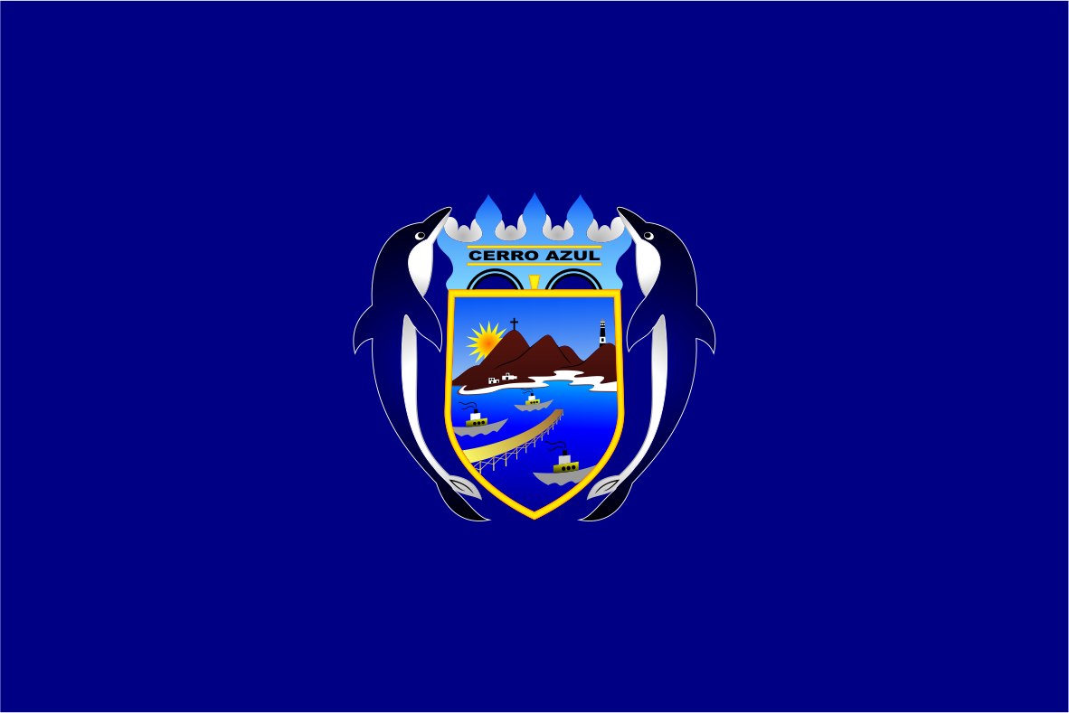 Distrito de Cerro Azul - Provincia de Cañete - Región Lima